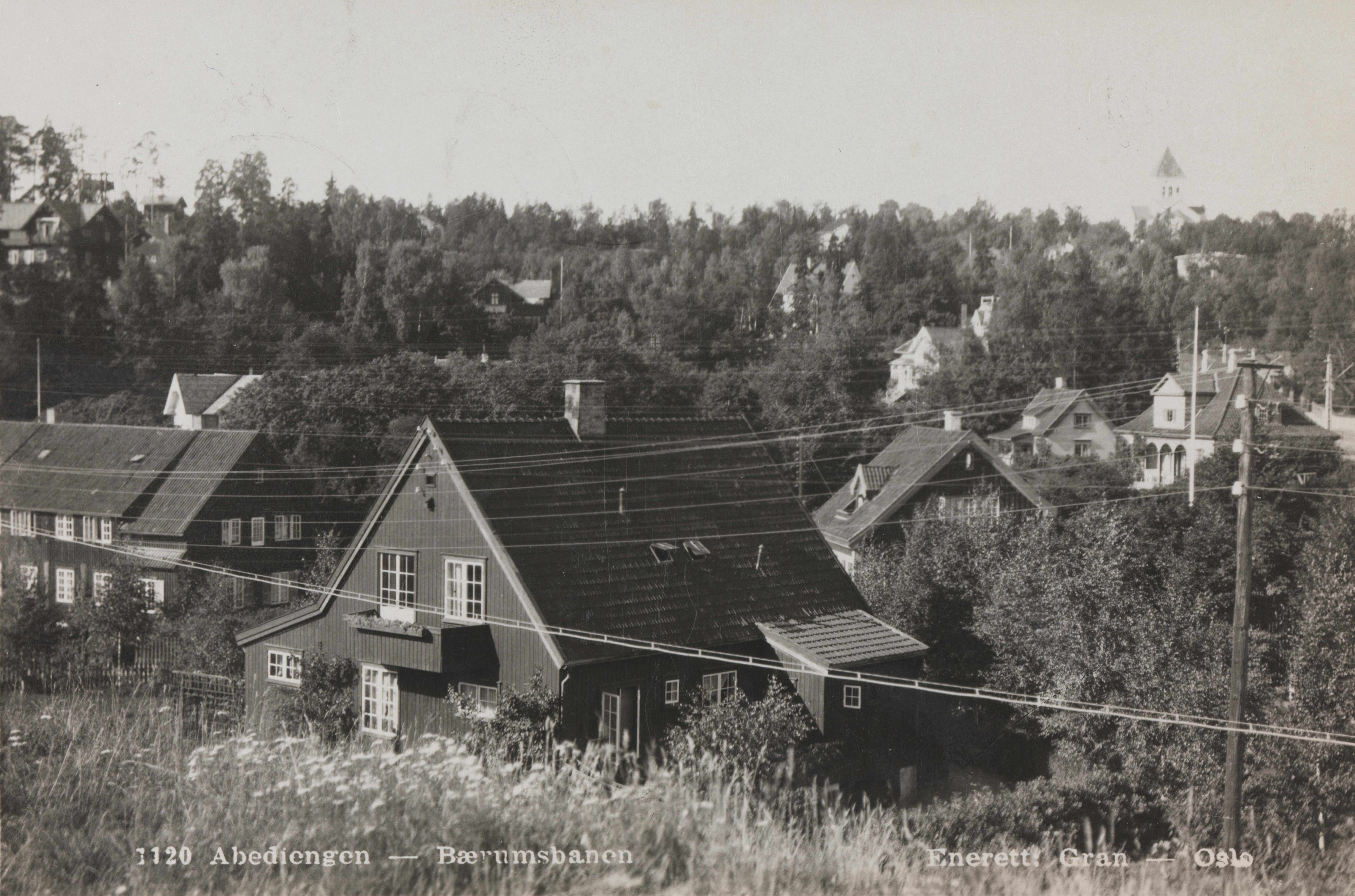 Bildet er hentet fra Nasjonalbibliotekets bildesamling Abbediengen,Ullern, Oslo, Oslo